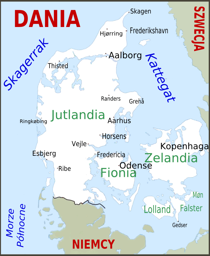 Mapka Danii z polskimi opisami